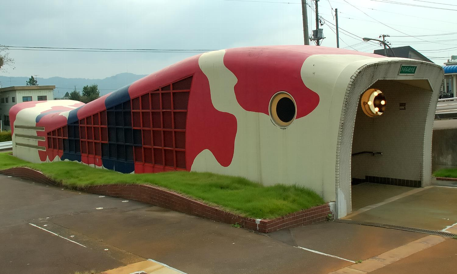 錦鯉の地下道。2005年9月小千谷駅近くで撮影。